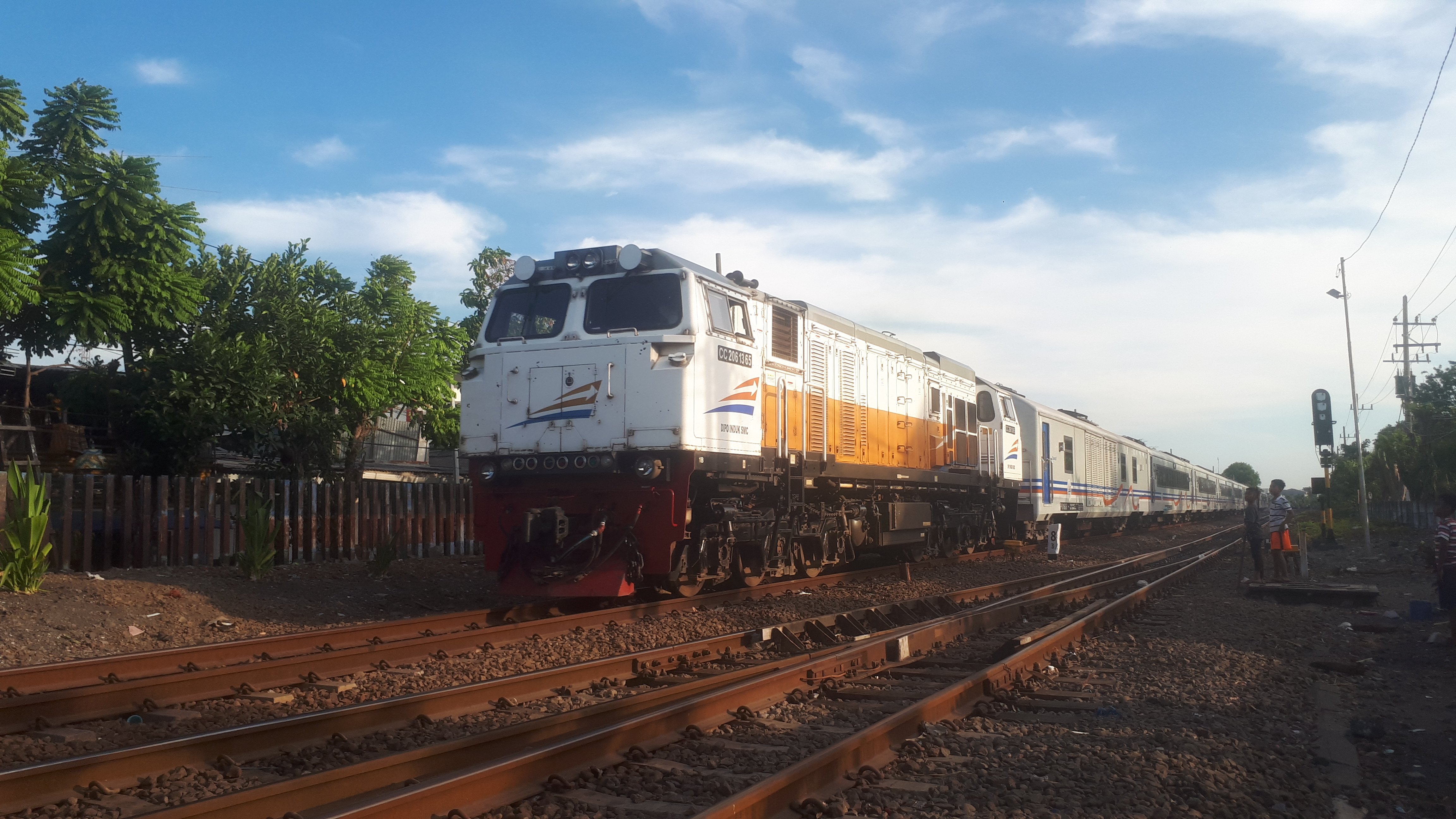 Kereta api Bima akan memasuki Stasiun Surabaya Gubeng, 2019.